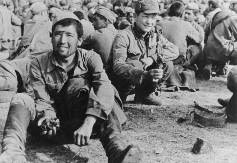 Russland - Shitomir, Ukraine 24.7.1941 [Herausgabedatum] Russische Kriegsgefangene im Lager. Heeresfilmstelle, Negativ-Nr.: M.229/9a